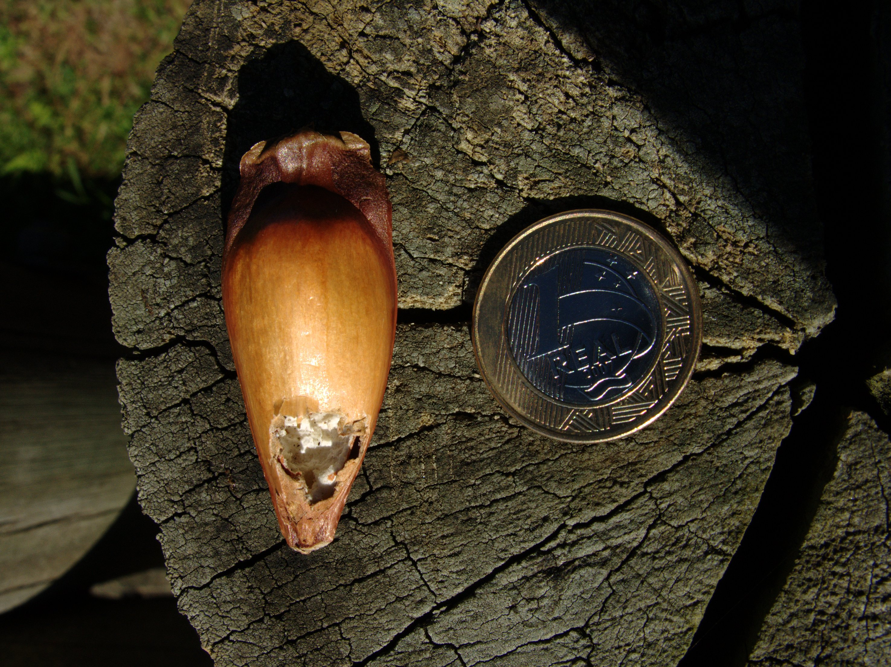 Piñón de Araucaria angustifolia (Araucariaceae). Curitiba, Brasil.